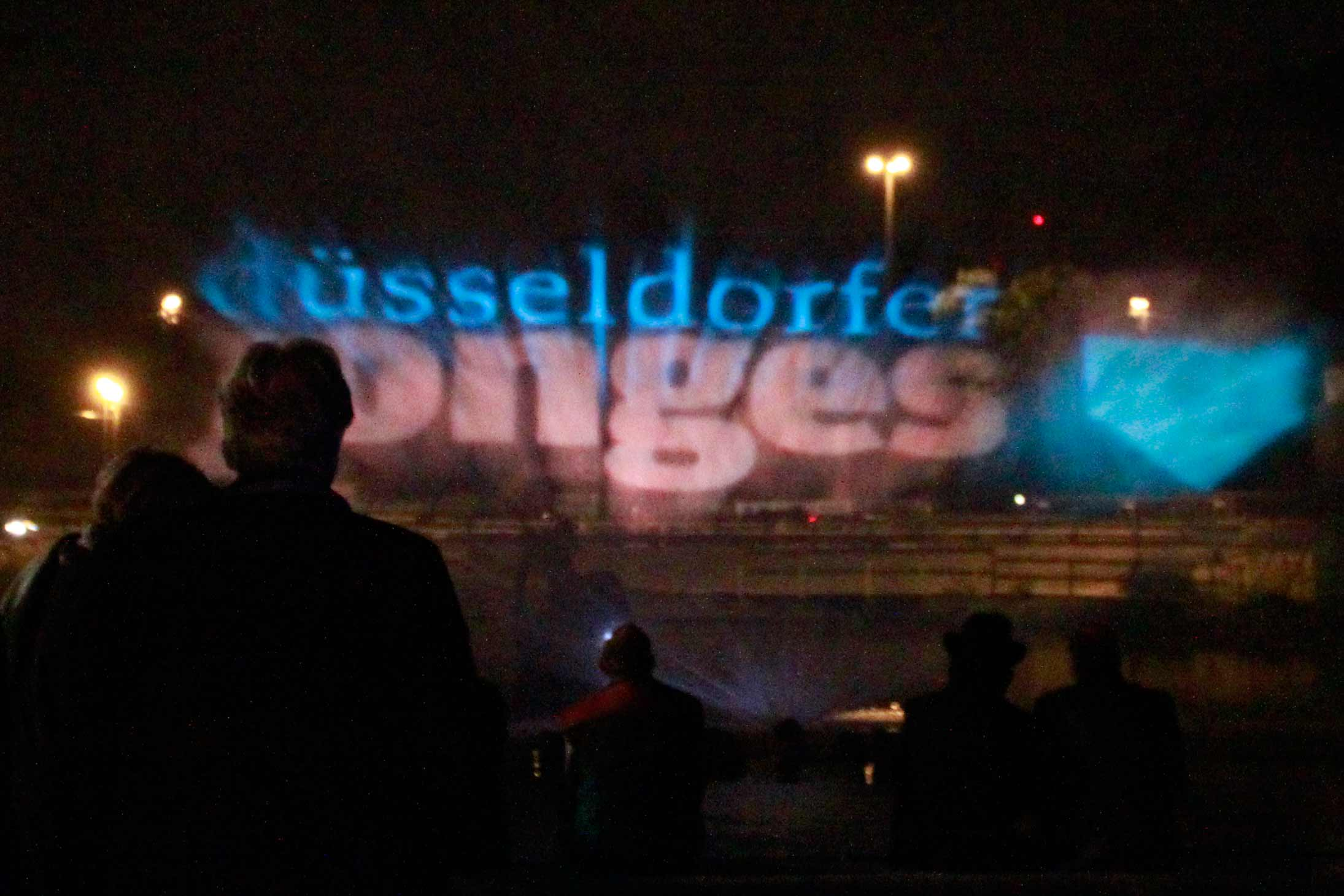 Illumination einer Fontaine am Jrönge Jong im Düsseldorfer Hofgarten zum 725. Stadtjubiläum 2013.